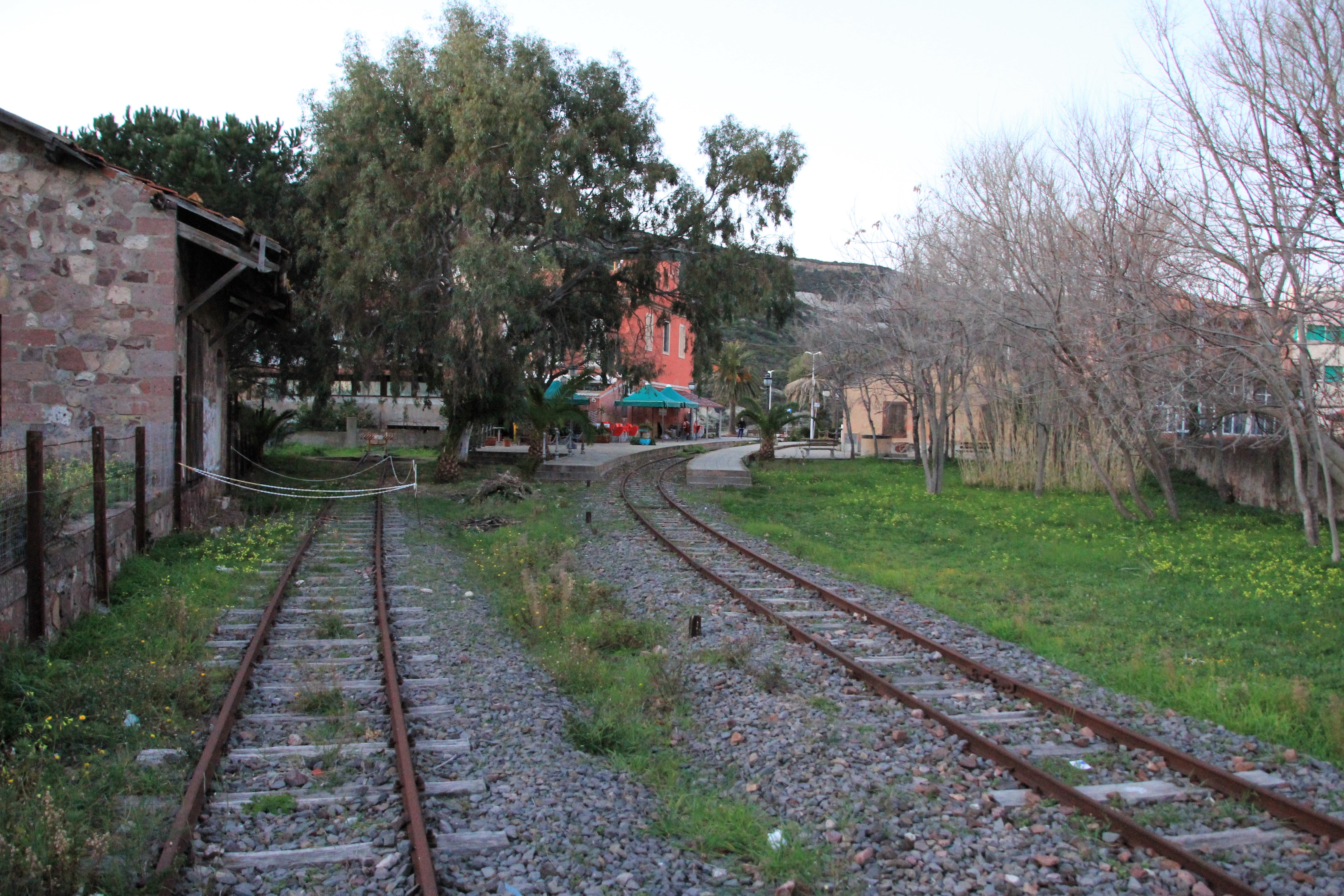 Bosa, stazione ferroviaria di Bosa Marina